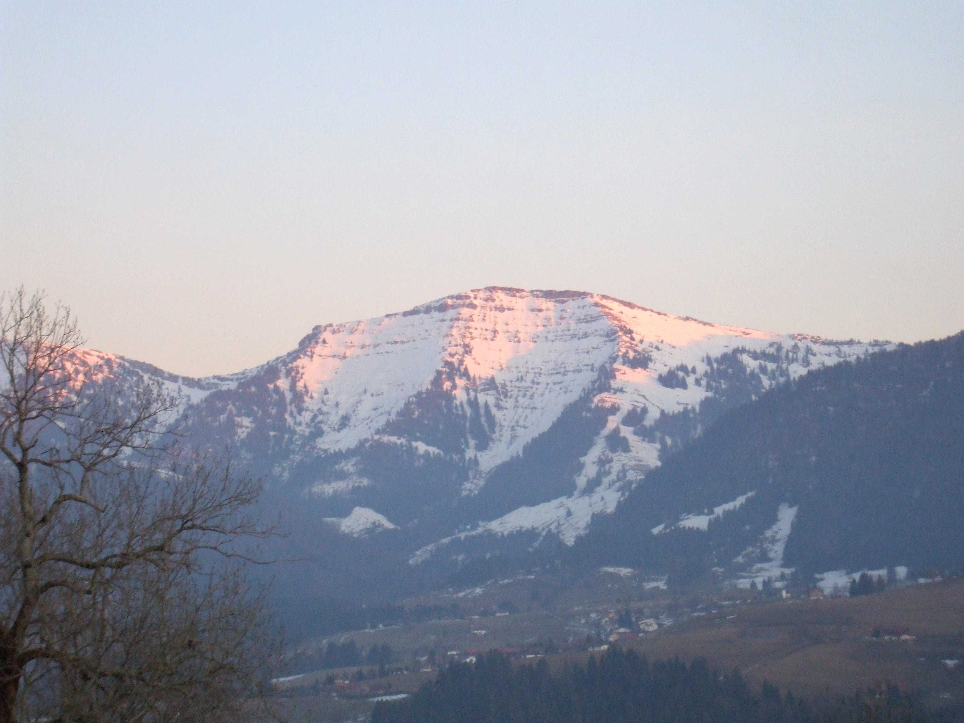 Der Hochgrat, Oberstaufen, Oberallgäu